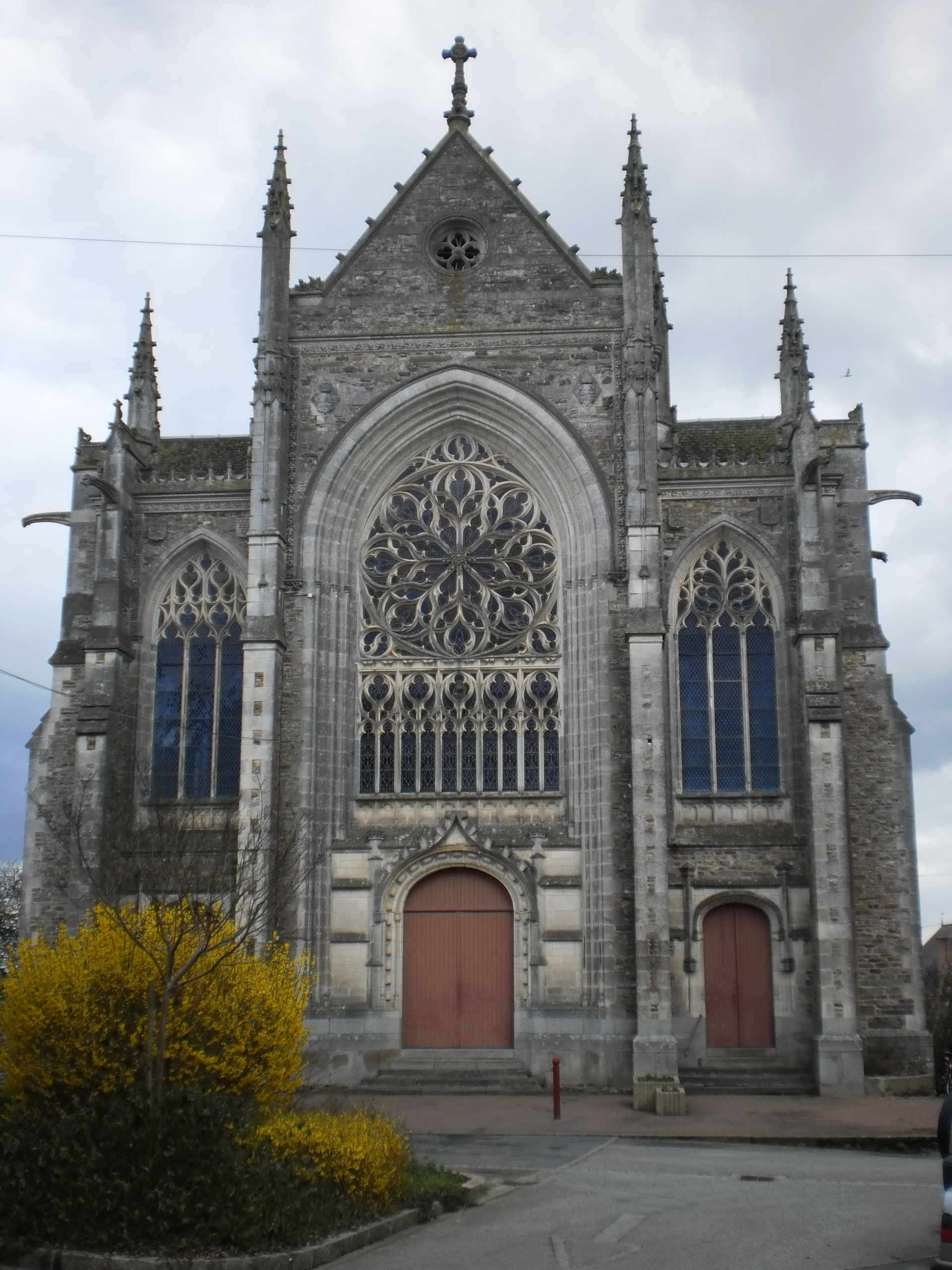 Saint-Julien-de-Vouvantes (Loire-Atlantique, France) - église